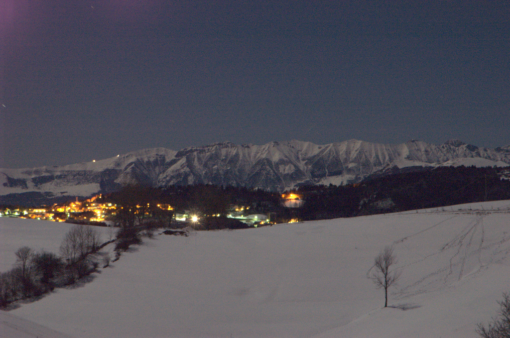 Veduta della catena del monte Baldo dai pascoli di Velo Veronese